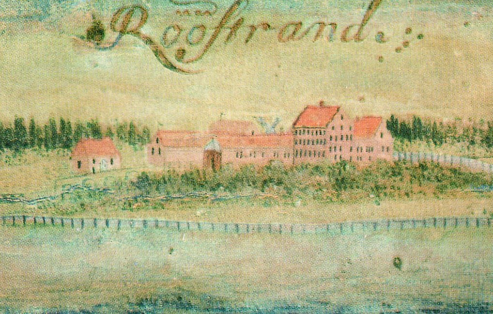 Detalj från Gripenhielms Mälarkarta, Rörstrand